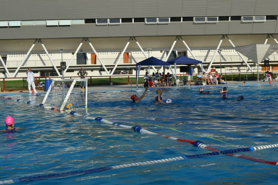 Campeonato nacional femenino waterpolo enero 2014, estadio nacional